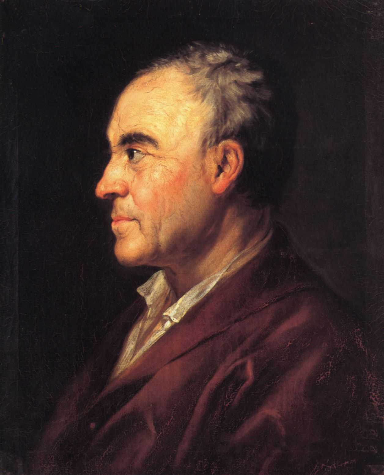 Porträt des Johann Georg Sulzer (1720-1779), schweizer Theologe, Philosoph, Übersetzer und Publizist. Gleimhaus Halberstadt